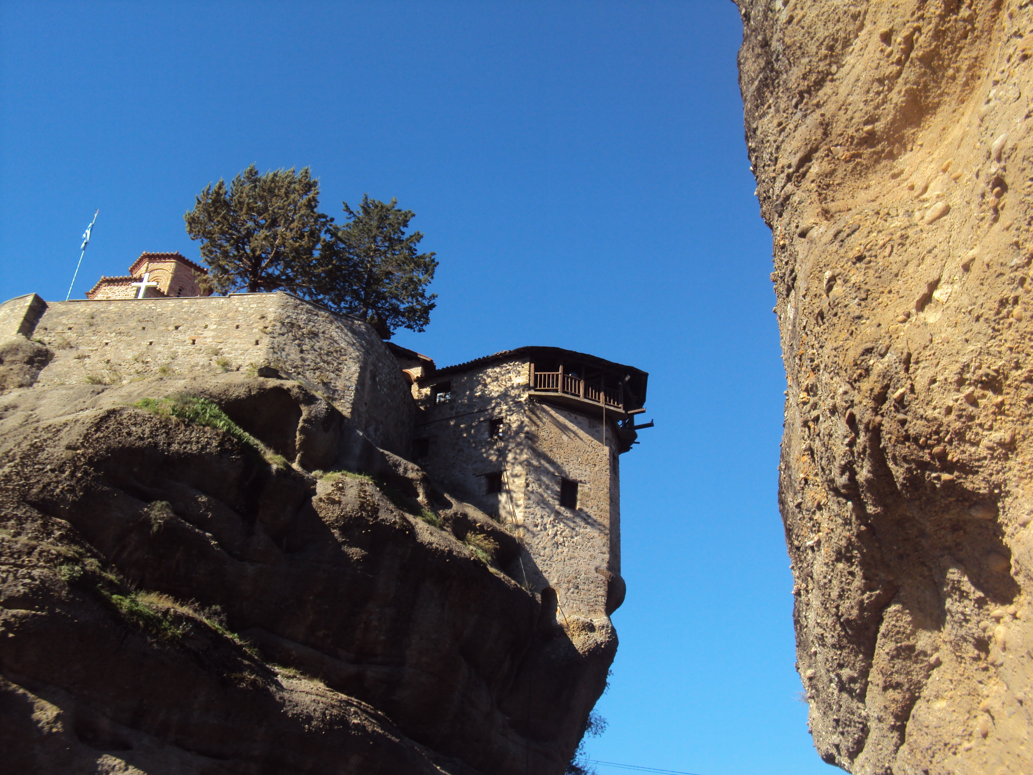 Μονή Βαρλαάμ Μετεώρων«Μονή Βαρλαάμ»